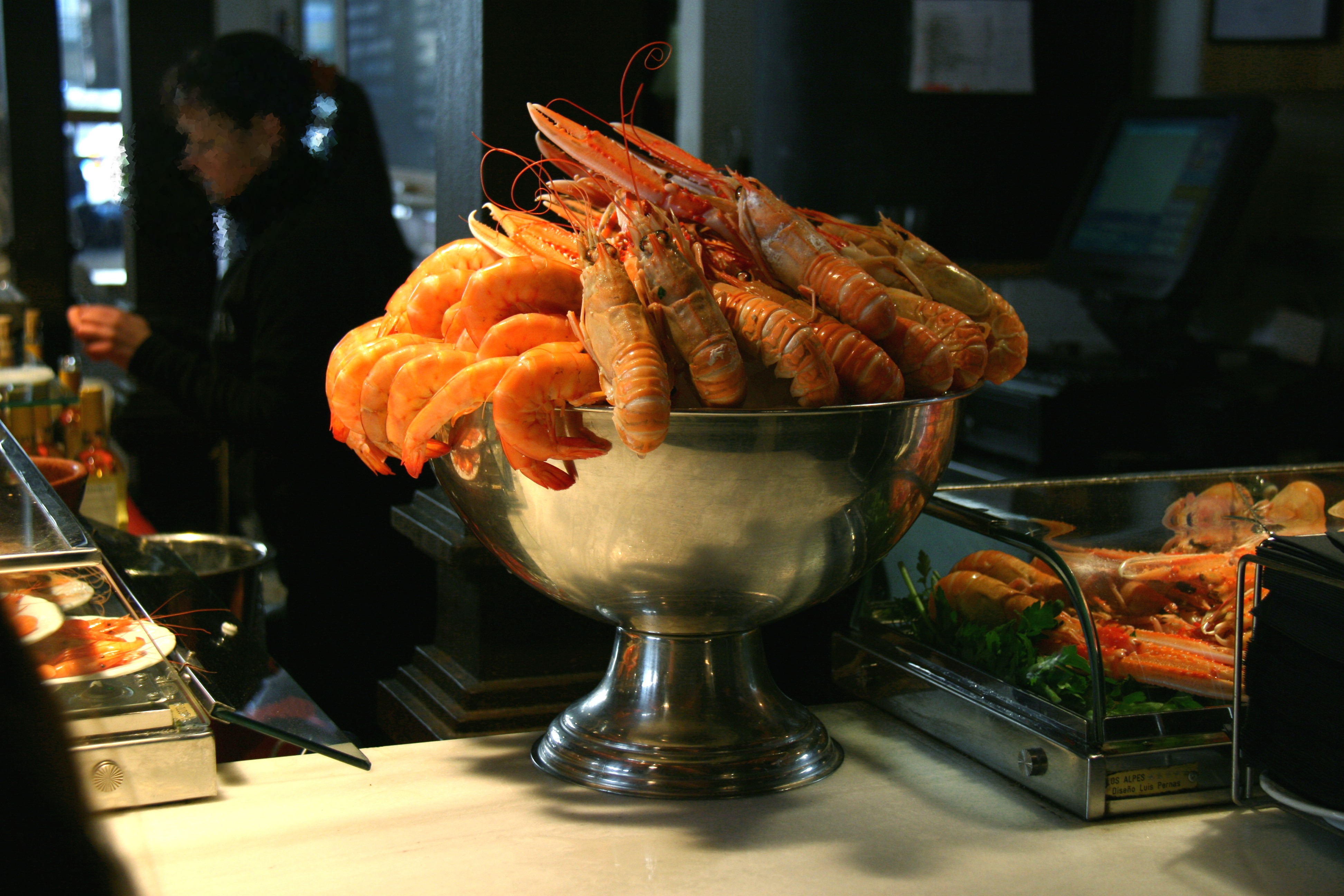 Copa marisco